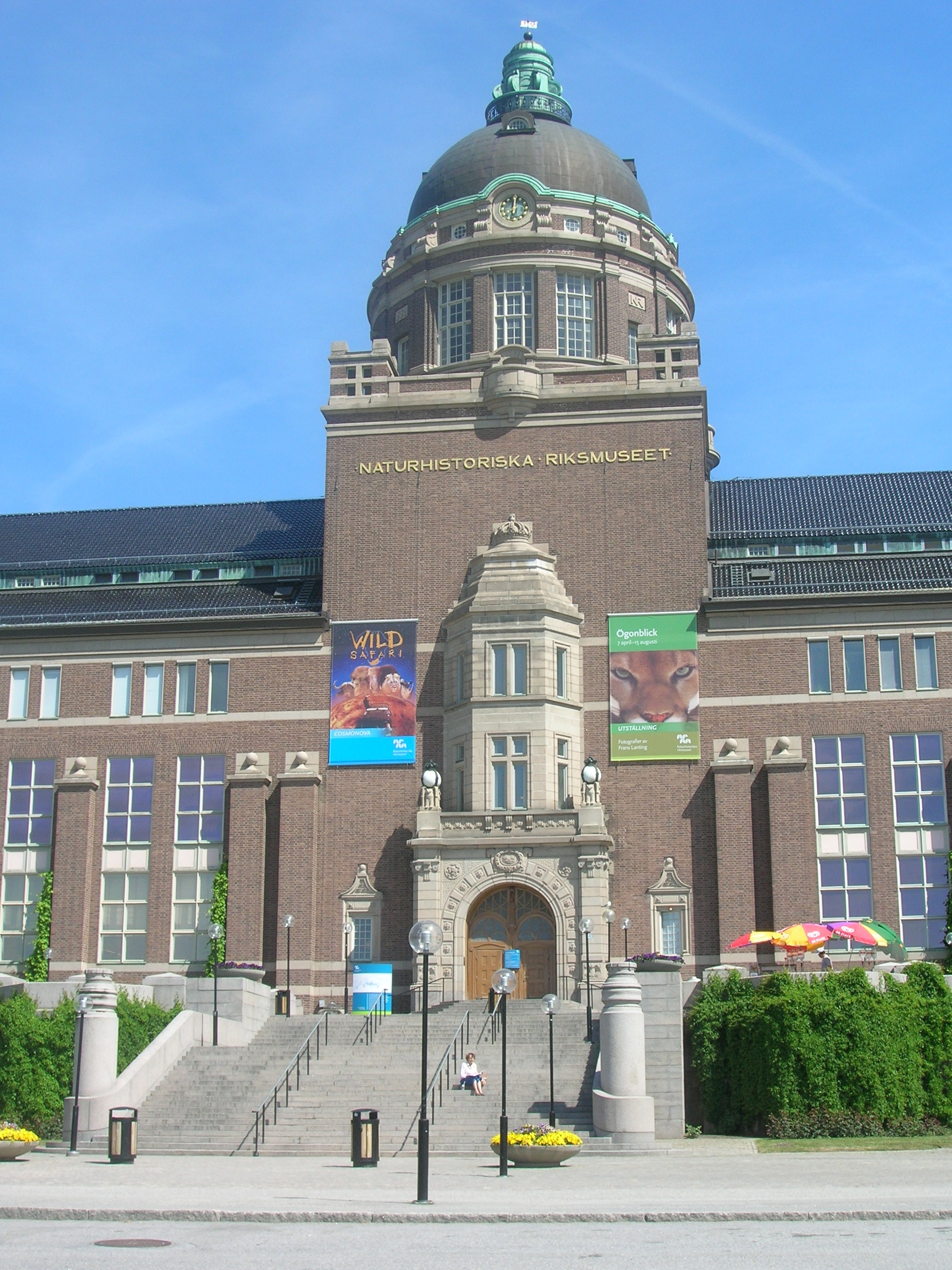 Naturhistoriska Riksmuseet sett västerifrån, Stockholm, Sweden.